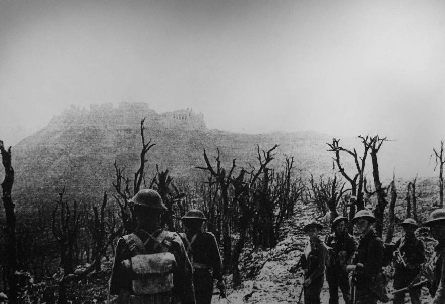 Савезнички војници у подножју Монте Касина.